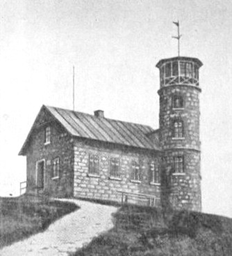 Die 1895 erbaute Warte auf Plešivec (Pleßberg) im Böhmischen Erzgebirge.